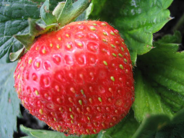 Fragaria × ananassa; Земляника садовая